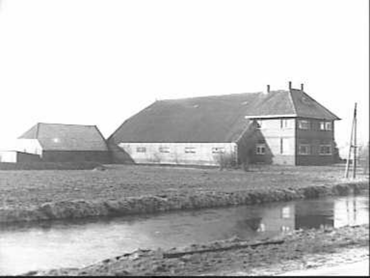 Veen- en zandgebied/ Boerderijen: zij- en voorgevel nr. L 16971 (opmerking: Deze afbeelding hebben wij helaas alleen in deze lage resolutie.) This is a possible Rijksmonument: Find the monument in the Monuments database: in Eerste Exloermond All Rijksmonumenten in Eerste Exloermond Is this a Rijksmonument? Yes No More information about this project and help. More images to work at in Category:Possible Rijksmonumenten.